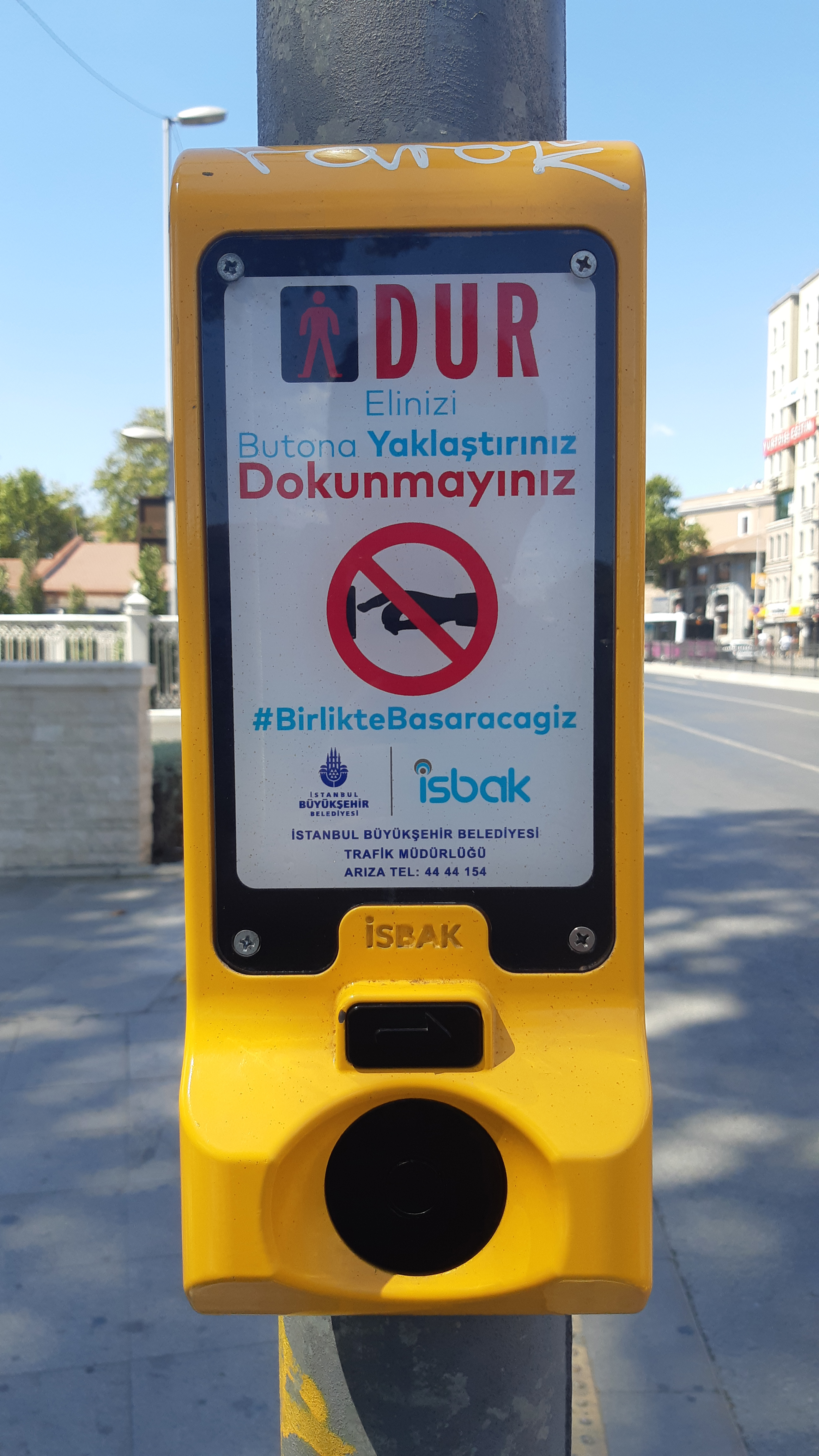 Koronavirüs pandemisinde teması azaltmak için İstanbul'da yapılan sensörlü yaya geçiş düğmesi